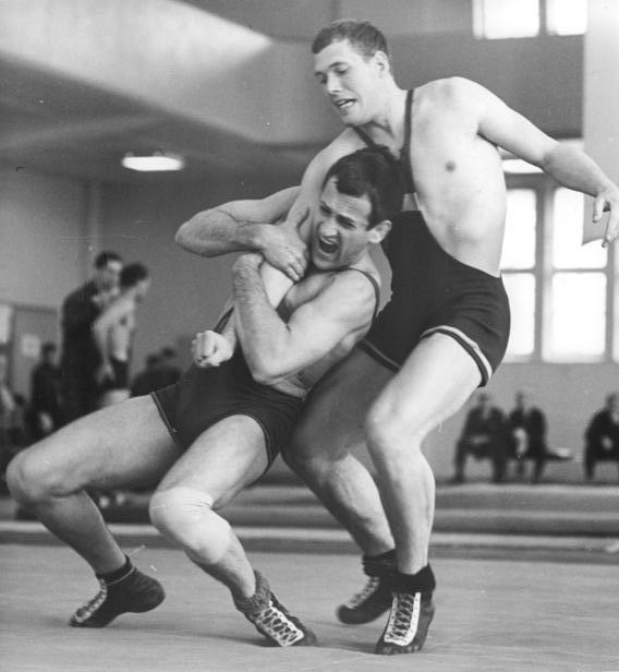 Lothar Metz, Jürgen Jendroczeck Zentralbild Kluge 28.4.1968 Leipzig: Deutsche Meisterschaften der DDR im Ringen (klassischer Stil) vom 26.-28.4.1968 in der Sporthalle Leplaystraße. Der Titelverteidiger und Vize-Europameister Lothar Metz (Rostock, links) gewann im Mittelgewicht in der II. Runde des Turniers gegen Jürgen Jendroczeck (Rostock, rechts) durch Schultersieg nach 4:45 min.